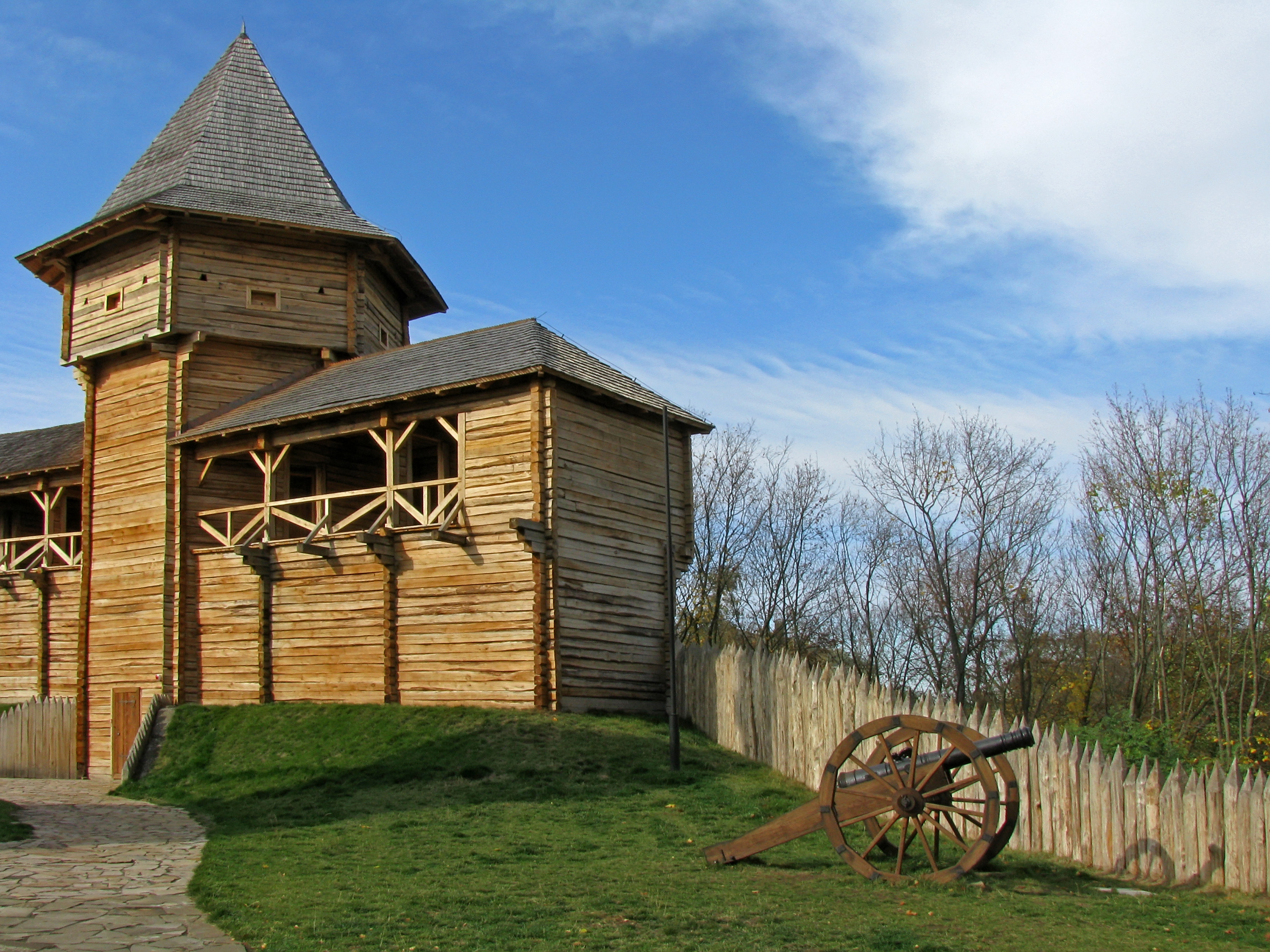 Поселення укріплене багатошарове «Батуринська фортеця», Батурин, між вулицями Партизанською, Петровського, Радянською та провулками Партизанським і Петровського